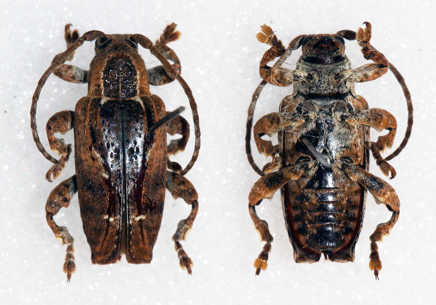 Aurivillius,1922 Sex: ? Data: 09-12-10 - Cuacua 36m - 8km East Caia - Zambezi River - Mozambique Size: 8.5mm